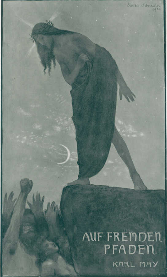 Deckelbild zu Karl Mays Reiseerzählung Auf fremden Pfaden (Sascha-Schneider-Ausgabe)